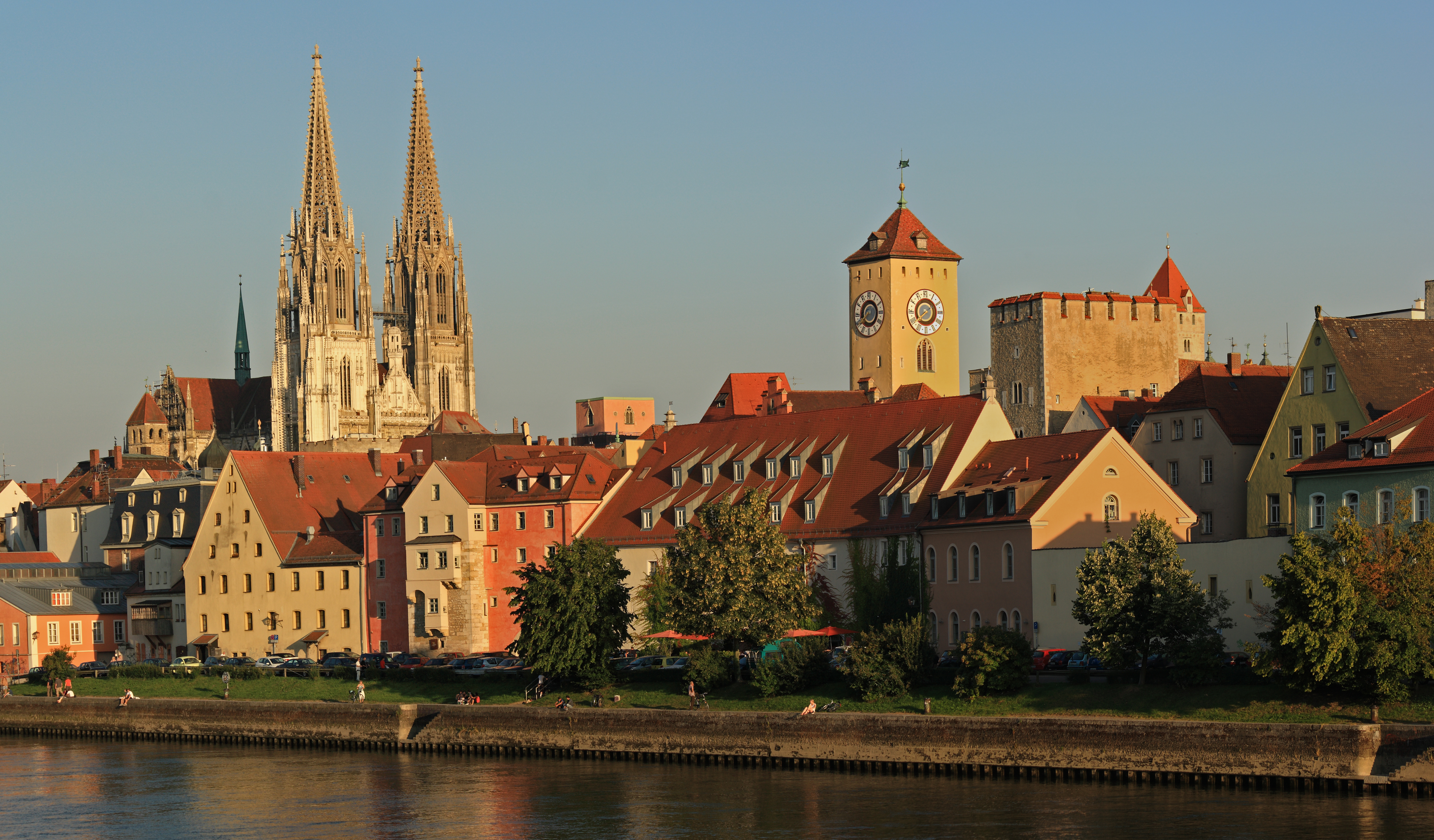 Dom St. Peter und Uhrturm des Alten Rathauses von Regensburg, fotografiert von Stadtamhof nahe dem Eisernen Steg. Zwischen den Dächern findet man zahlreiche Geschlechtertürme aus dem Mittelalter. Die Straße zwischen dem Ufer und den Gebäuden heißt Weinlände. Das Bild wurde per "stitching" aus drei Einzelbildern erzeugt.